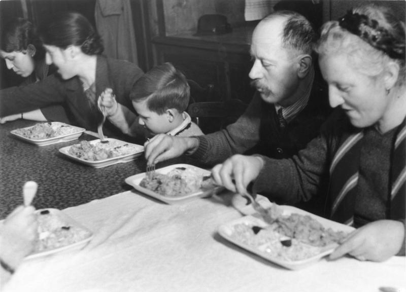 Innsbruck Umsiedlung der Südtiroler: 1. Mahlzeit auf deutschem Gebiet